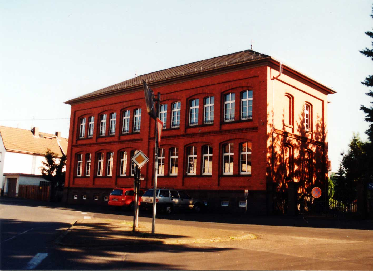 Grundschule Ettingshausen (Gemeinde Reiskirchen), eigenes Foto